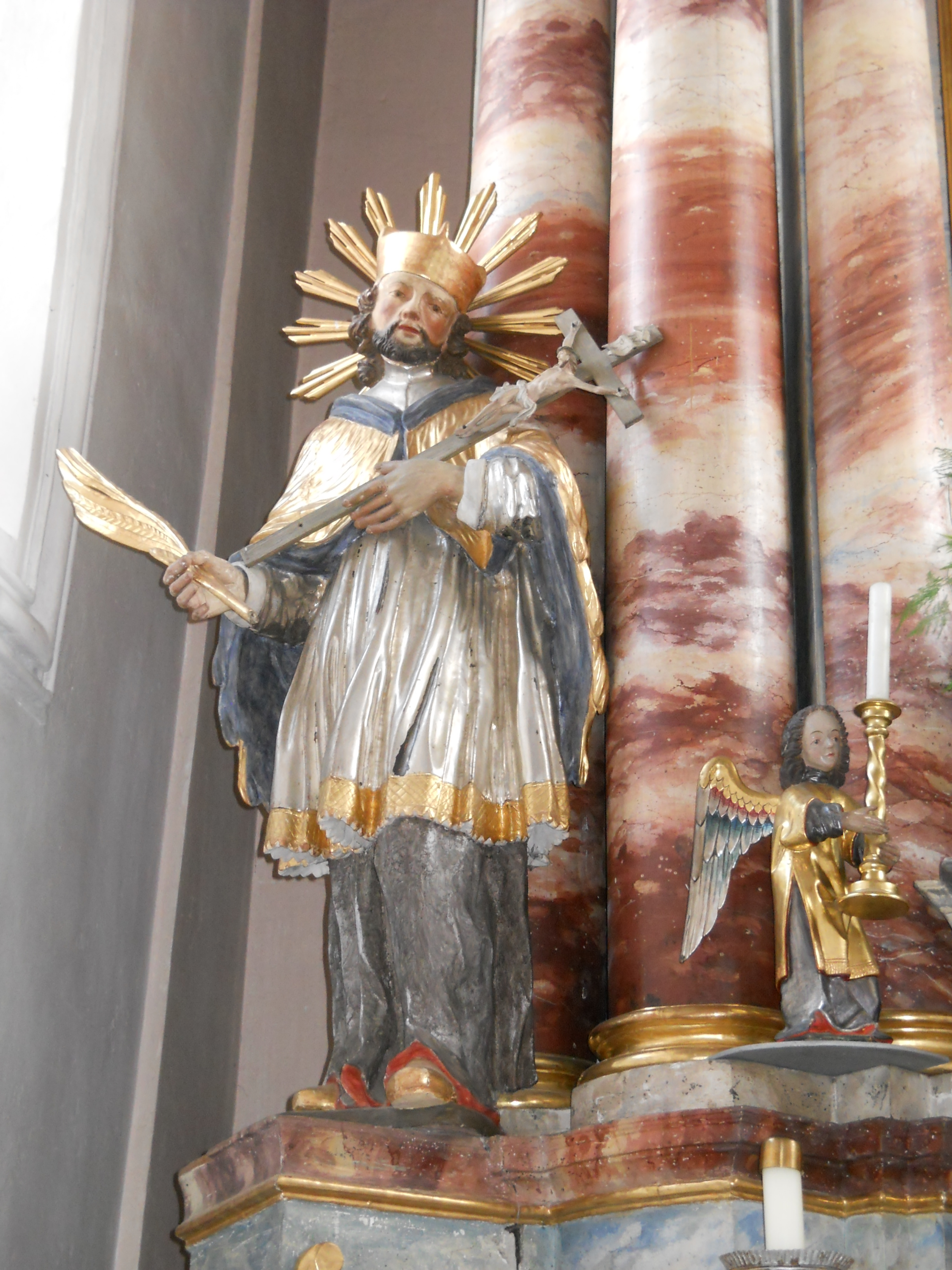 Johannes Nepomuk-Statue in der Pfarrkirche St. Ulrich in Kevenhüll, Gemeindeteil von Beilngries im oberbayerischen Landkreis Eichstätt